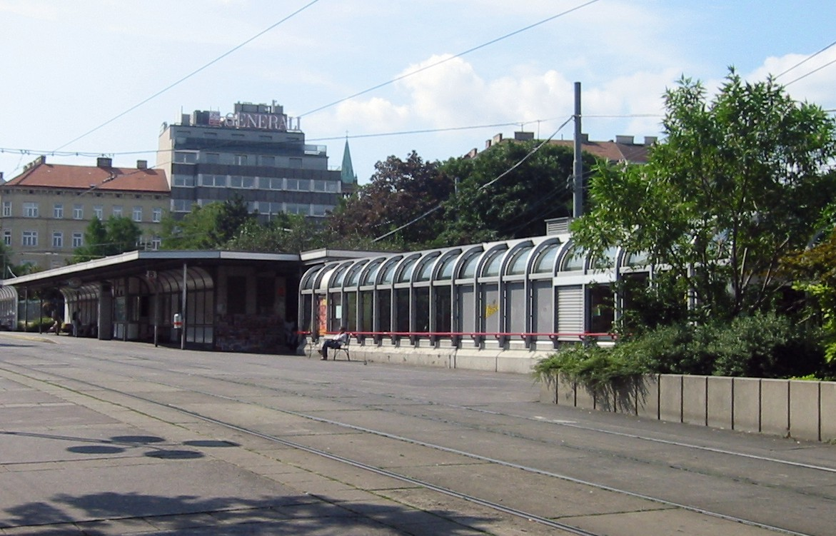 Wien, U-Bahn-Station Reumannplatz